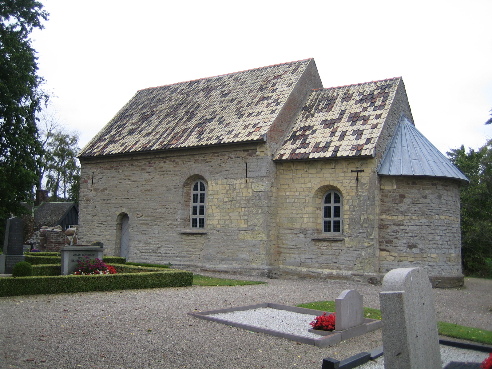 Borrie kyrka. Bilden tagen av mig själv 11 september 2005.